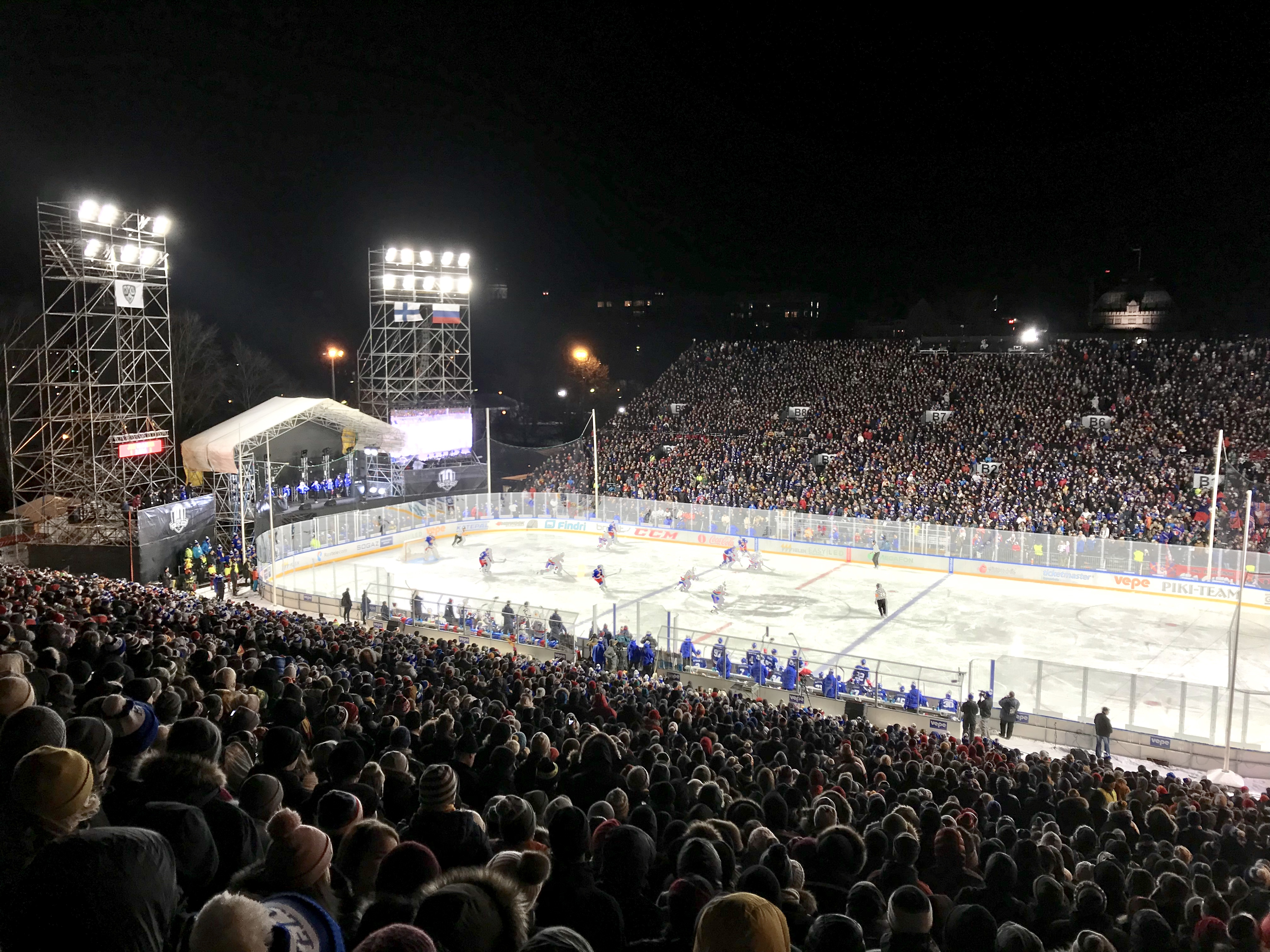 Helsinki Ice Challenge in Kaisaniemi, Helsinki.